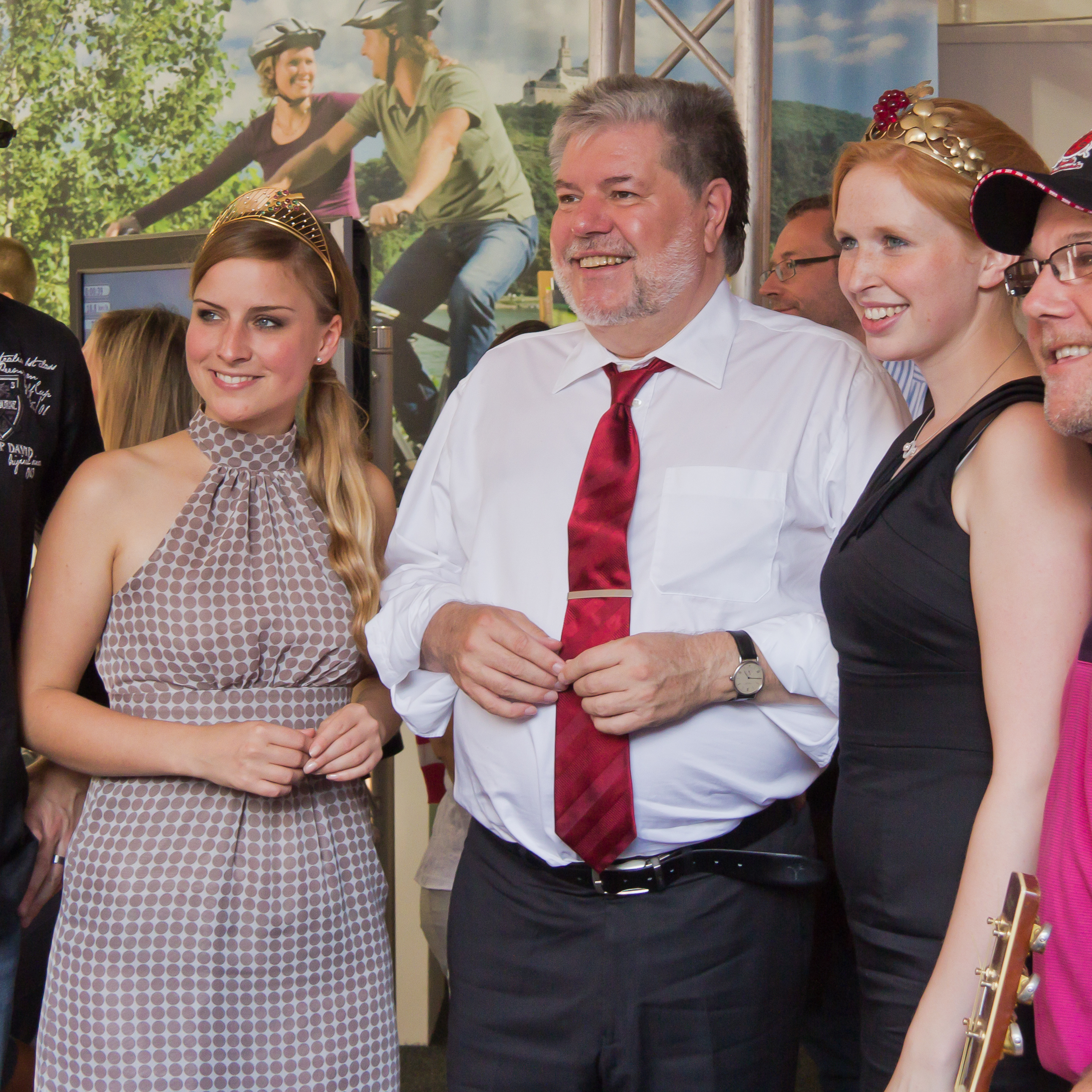 Deutschlandfest 2011 in Bonn: Deutsche Weinkönigin Annika Strebel 2011/12 (links) und König Kurt (Beck), Ministerpräsident, sowie die Ahr-Weinkönigin 2011/12 Julia Bertram, auf dem Stand des Bundeslandes Rheinland-Pfalz.